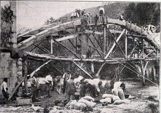 Obras del puente de Golbardo lelvadas a cabo entre 1902 y 1903. En el municipio de Reocín, Cantabria (España).